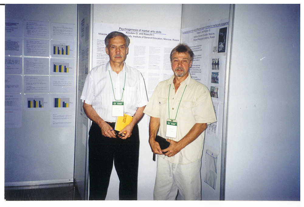 Г.Б. Крюков и И.А.Красулин на конференции ISSBD в Пекине, 2000г.